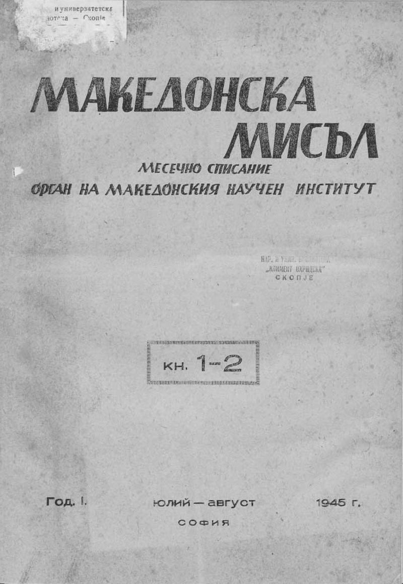 Корица на книжка 1-2 на Македонска мисъл